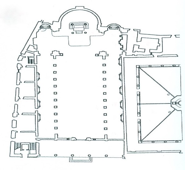 Pianta della Basilica